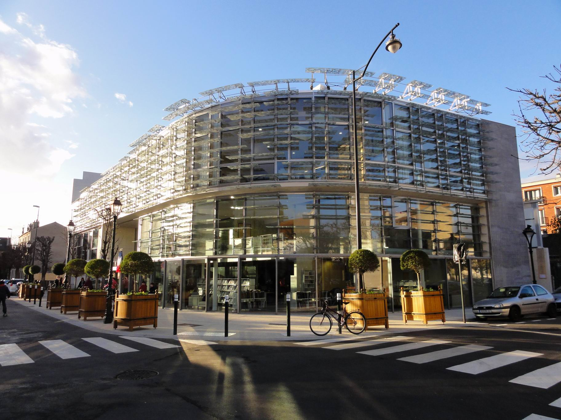 La médiathèque, le jour de son inauguration, le 10/12/2011